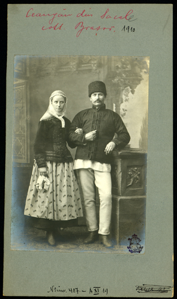 Adler - Familie de ceangăi din Săcele, jud. Braşov